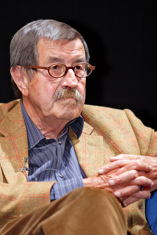 Günter Grass. Beim Häuten der Zwiebel Buchpremiere; Lesung und Gespräch Moderation: Wolfgang Herles 4. September 2006, 20 Uhr, auf dem Blauen Sofa im Berliner Ensemble